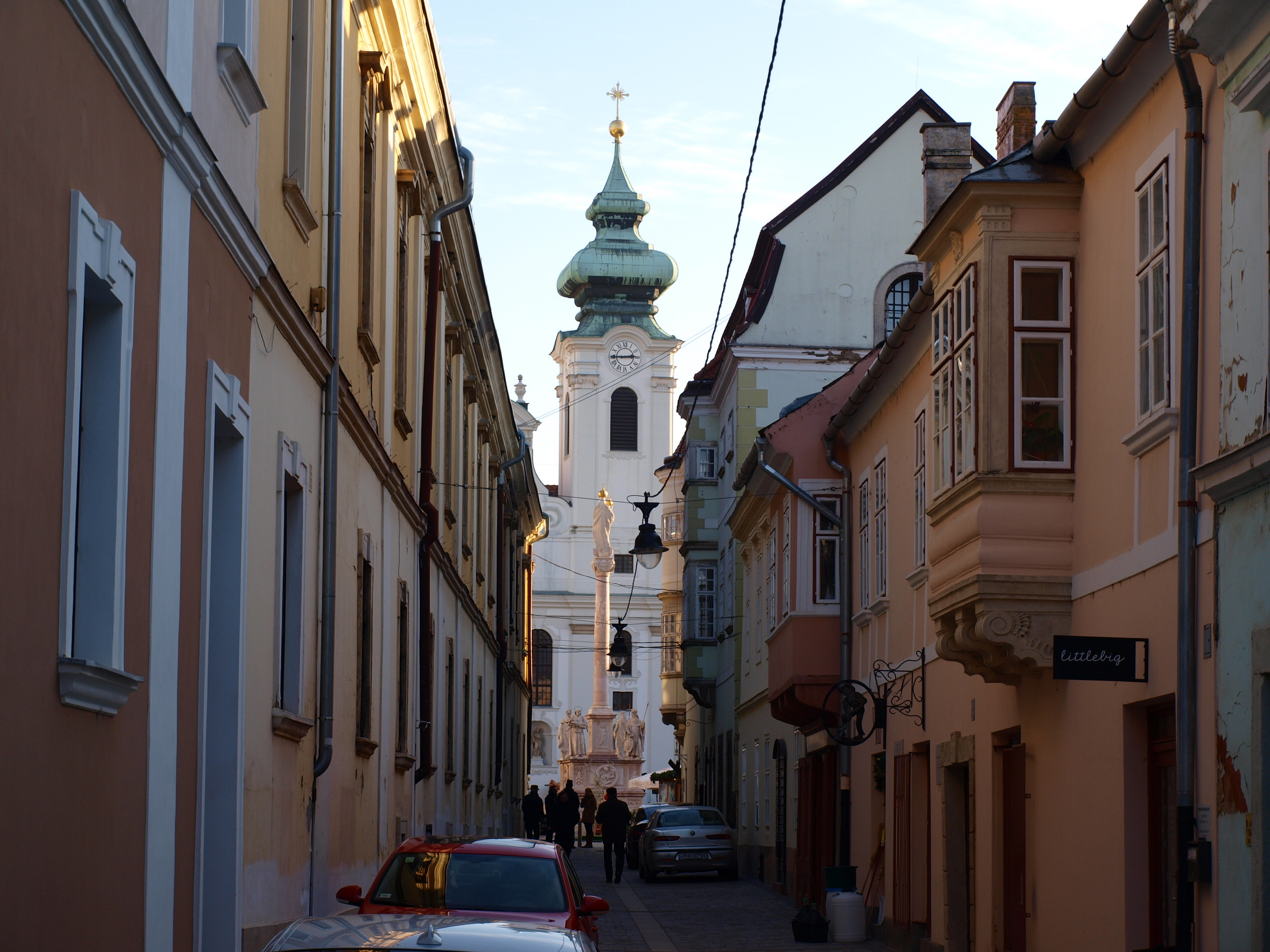 Győr sv. Ignác zdálky